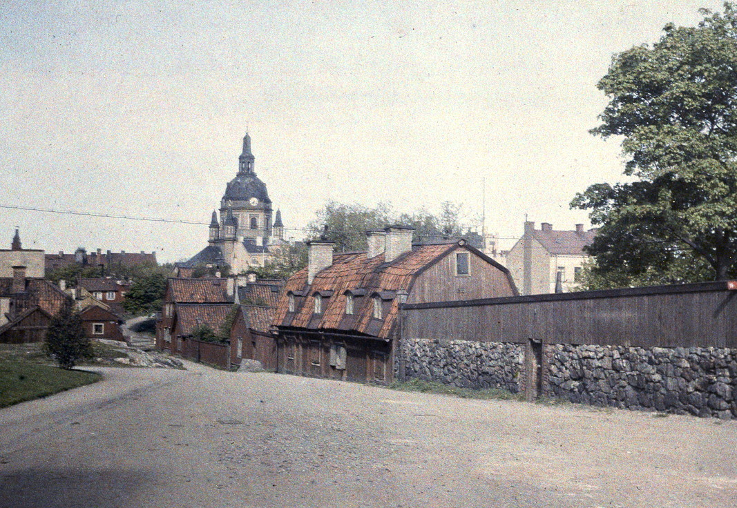 Stigbergsgatan västerut i höjd med Stammen 38